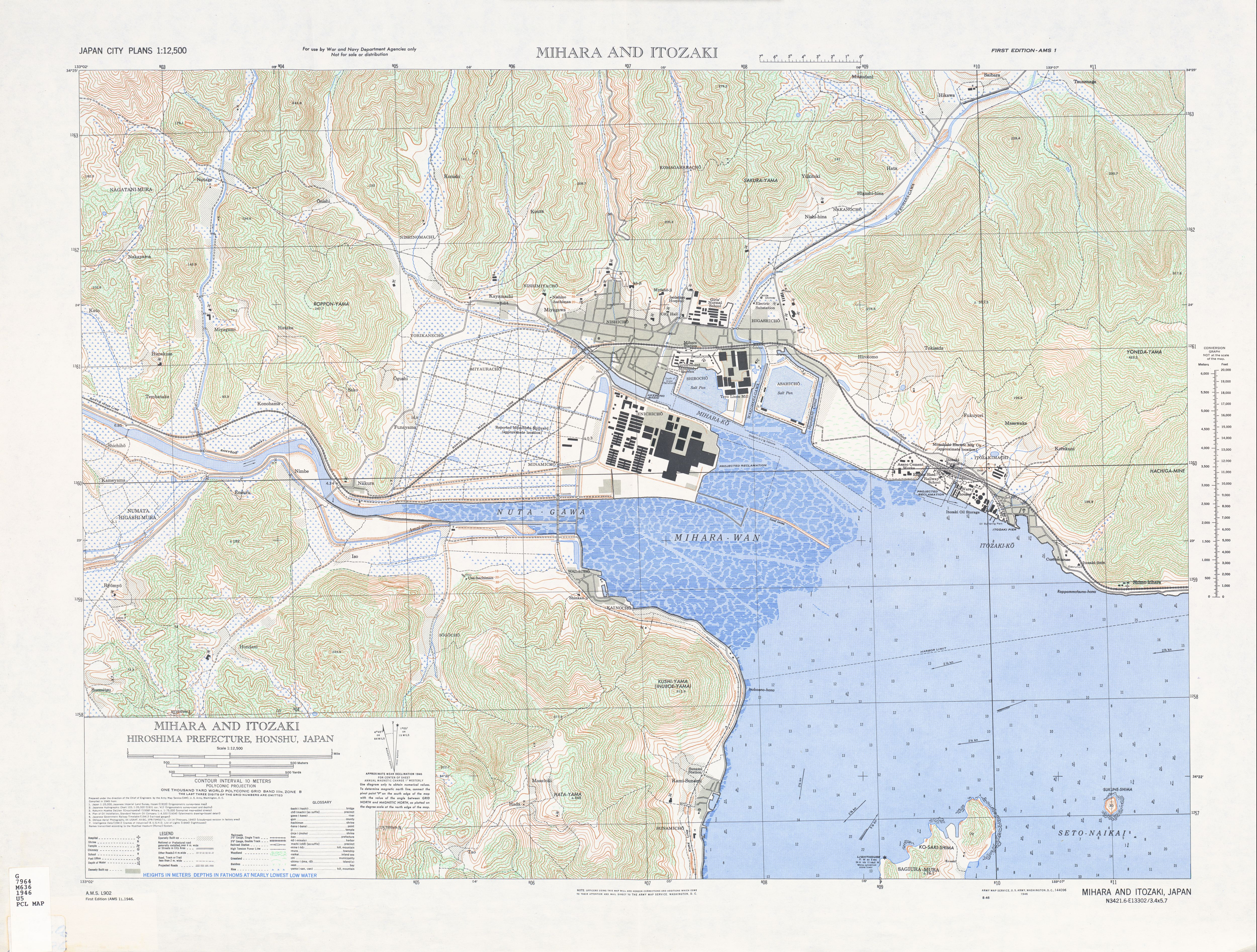 1945年アメリカ軍が作成した広島県三原市の地図。一部1930年代の情報で書かれている。